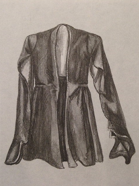 Чуха с прорезными рукавами. Шуши. XIX в.